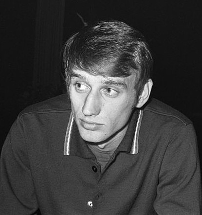 Koppen Nederlandse voetballers; Rob Rensenbrink.